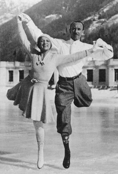 Chamonix : M. et Mme Brunet-Joly patinant : [photographie de presse] / Agence Mondial